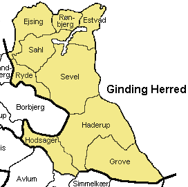 Ginding Herred, Ringkøbing Amt, Denmark